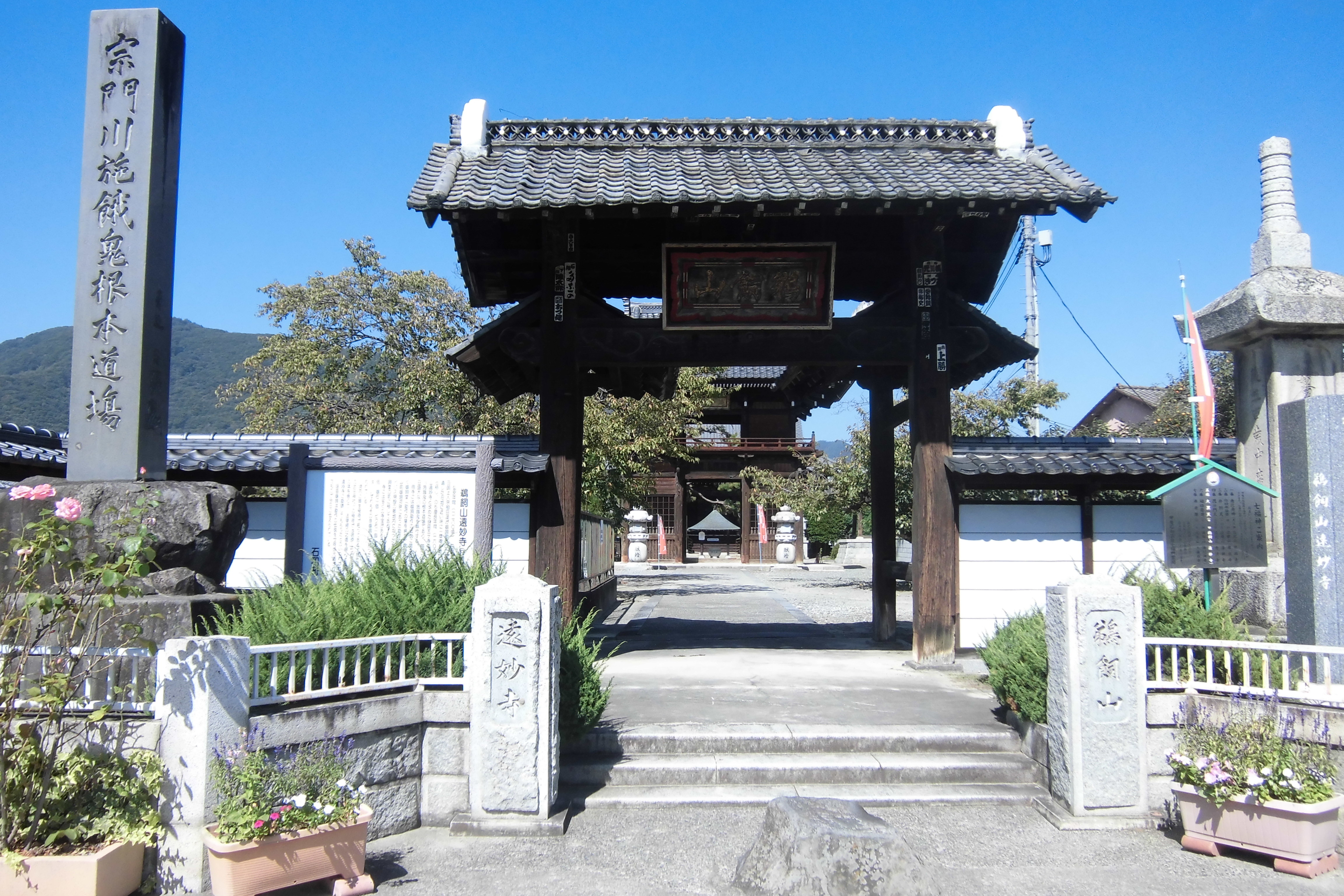 遠妙寺（山梨県笛吹市石和町市部）